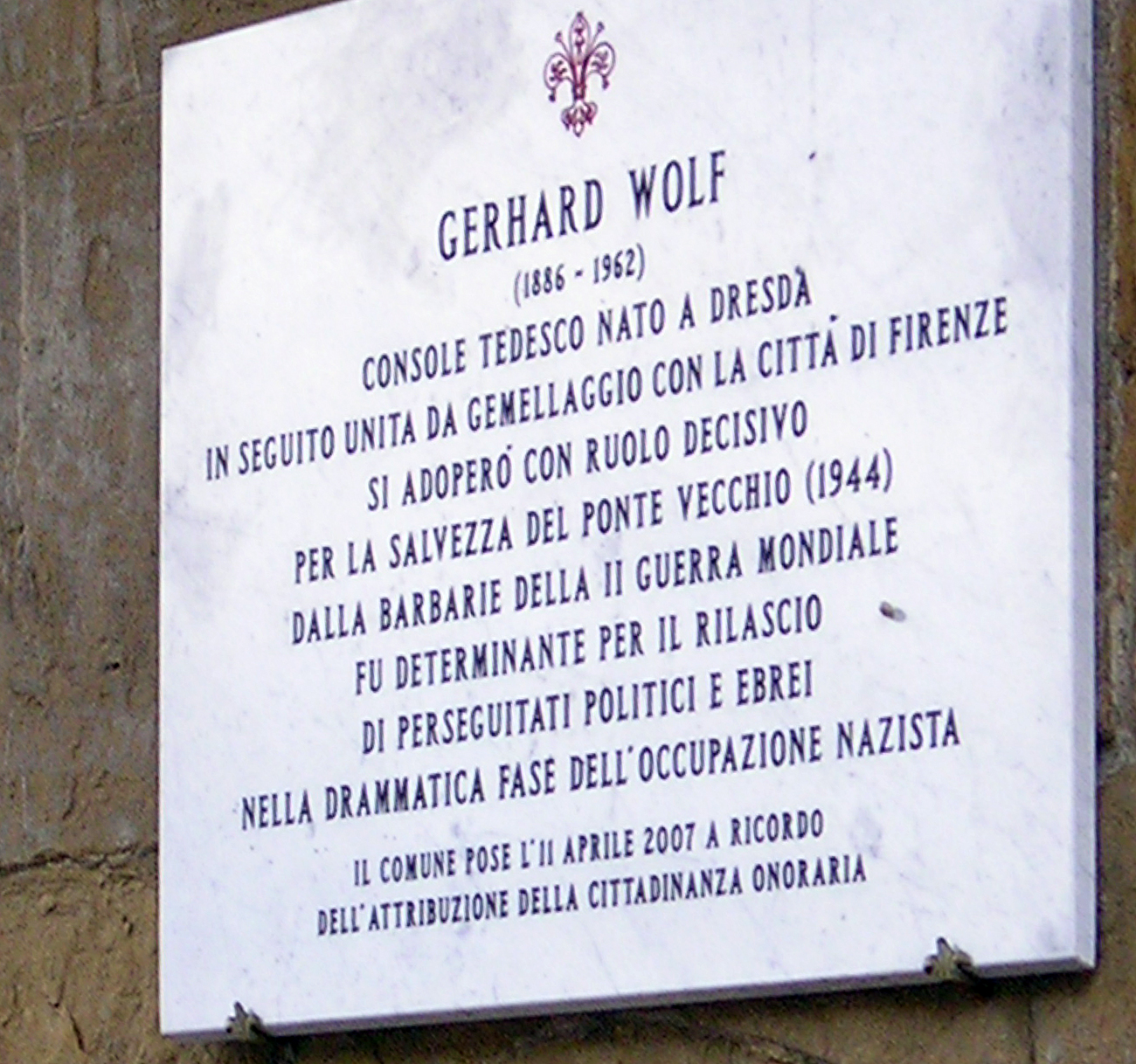 Iscrizione dedicata a Gerhard Wolf sul Ponte Vecchio a Firenze